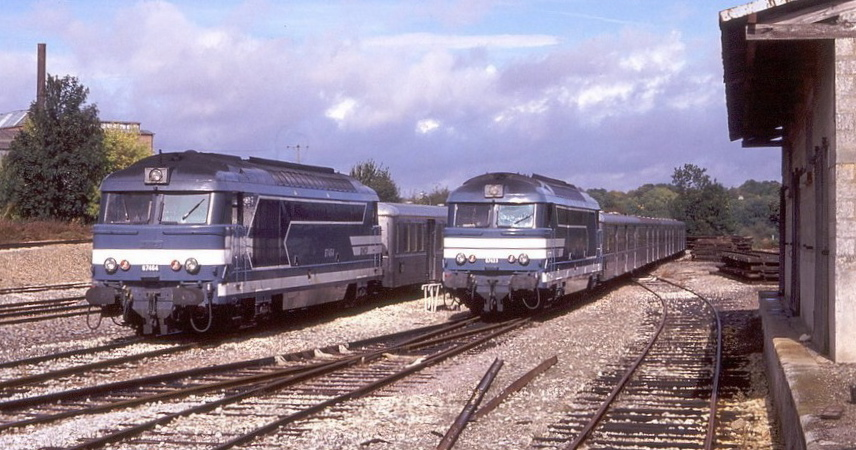 Le dernier type de trains ayant assuré la desserte de la ligne Coulommiers-La Ferté Gaucher (dépôt du terminus.